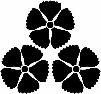 三つ撫子